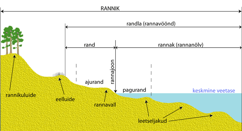 Kuhjelise rannavööndi elemendid Kaarel Orviku järgi